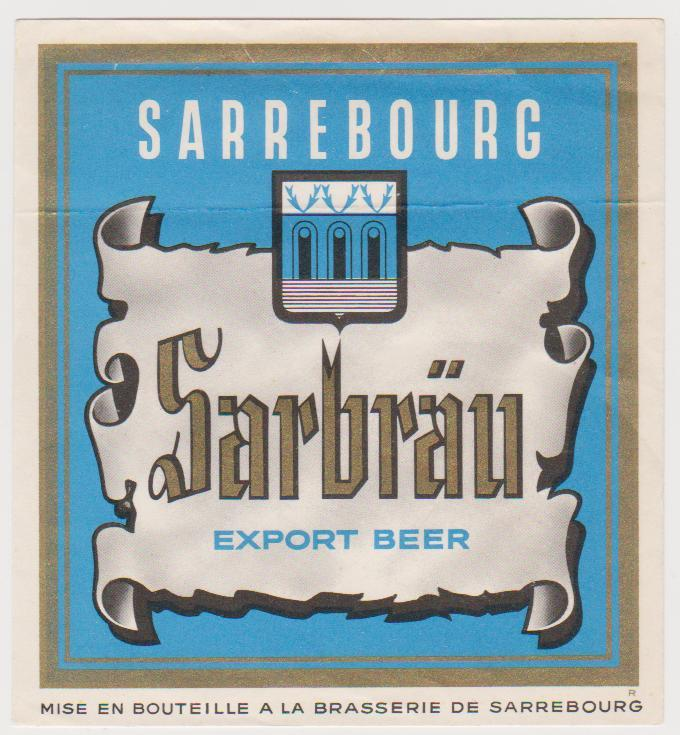 Sarrebourg - Sarbräu - Export Beer.